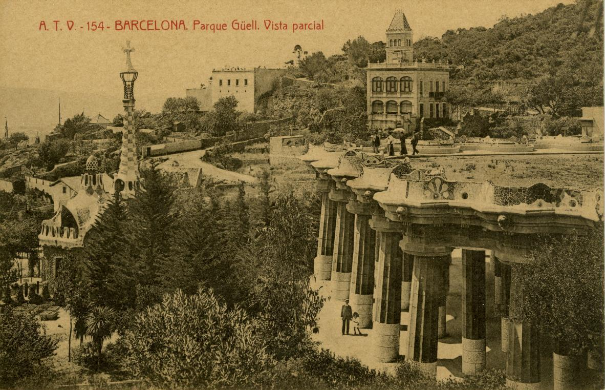 Vista parcial del parque Güell (h. 1916-1922).